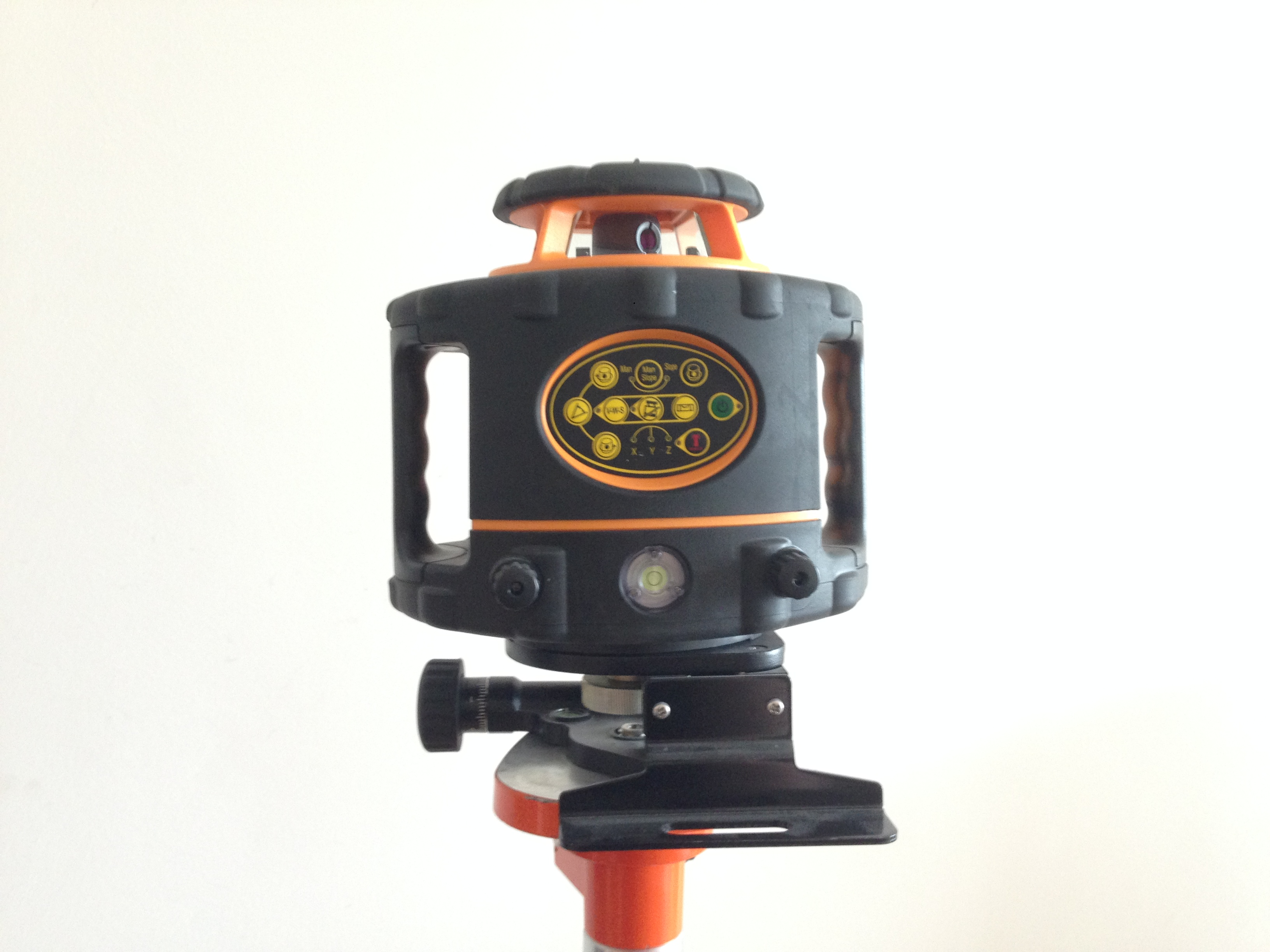 Lazerinis nivelyras